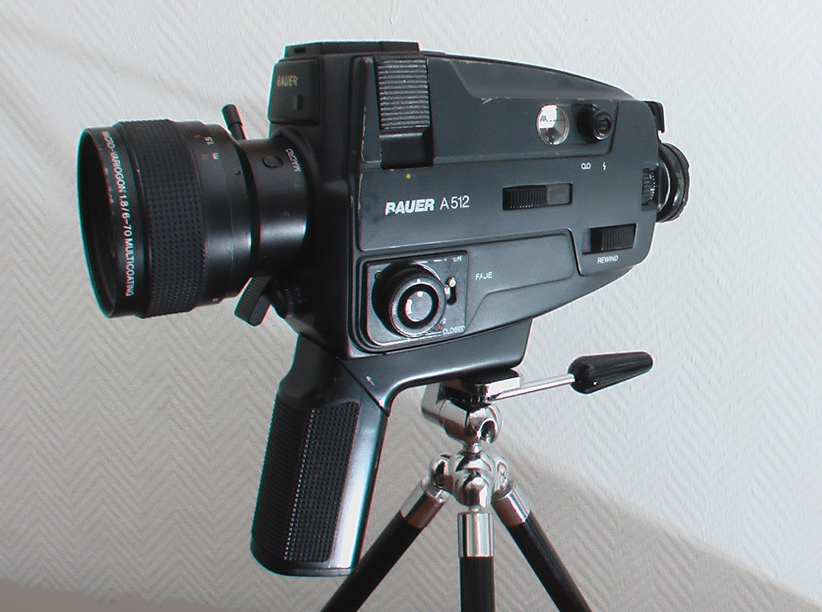 Super8KameraBauerA512Links